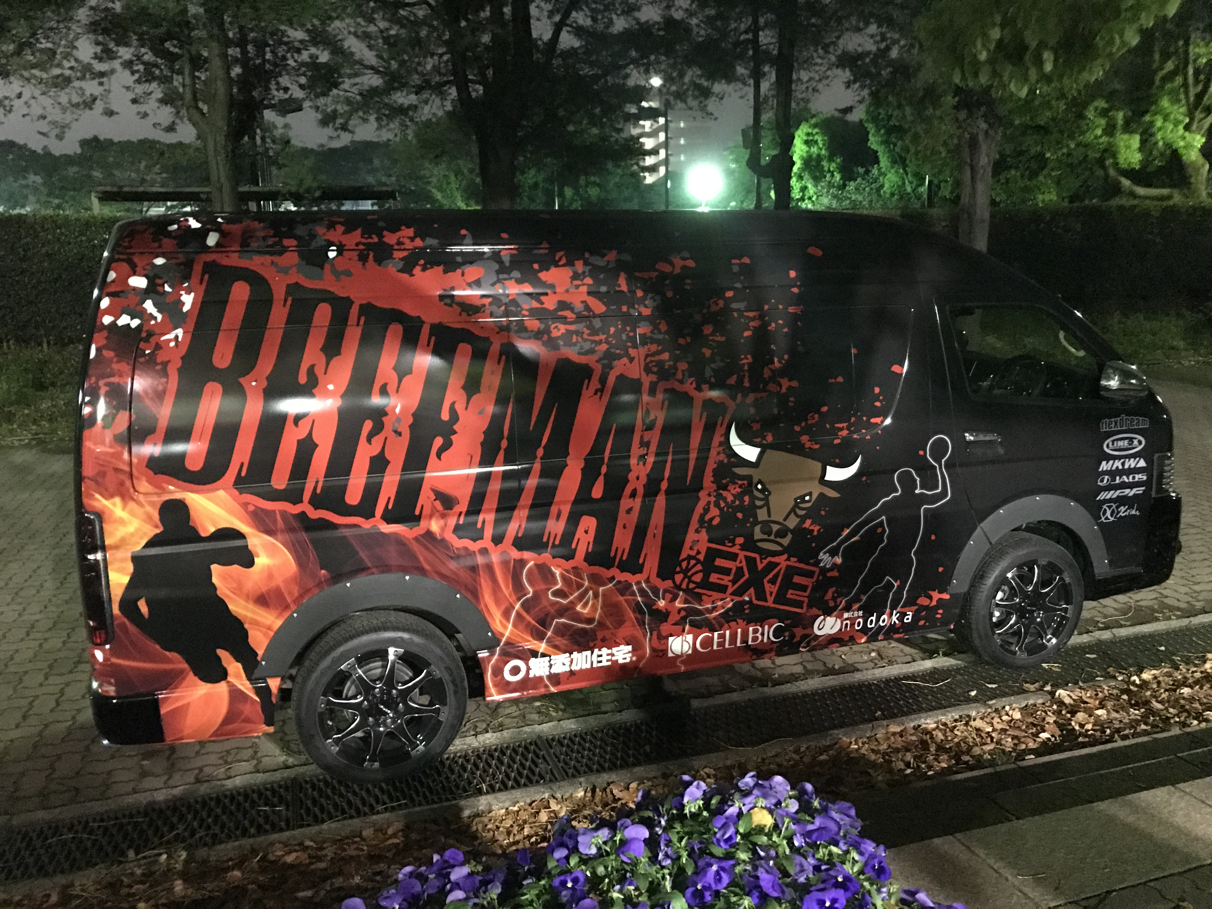 BEEFMAN.EXE サポートカー